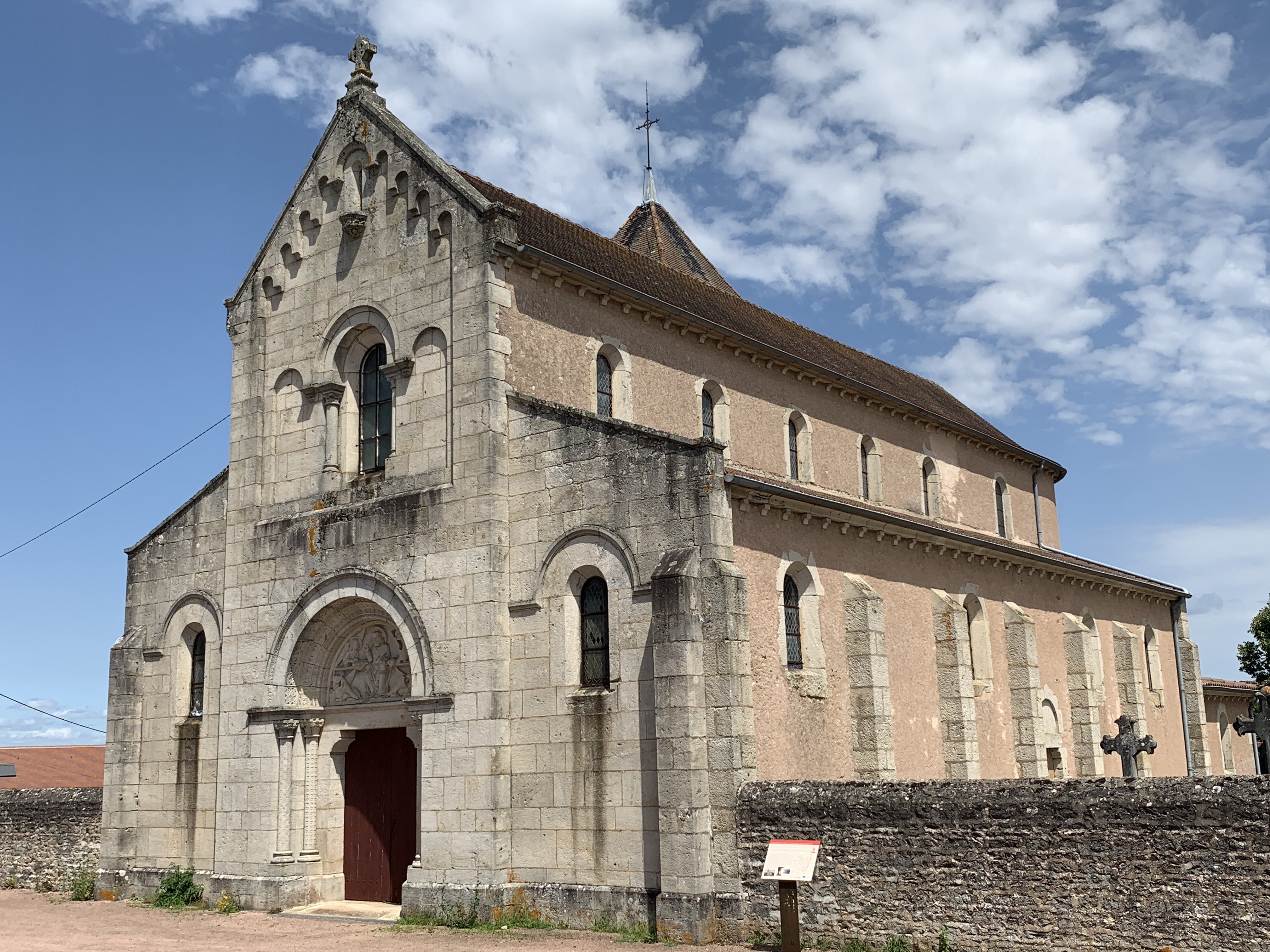 Église Saint-Pierre de Pressy-sous-Dondin.